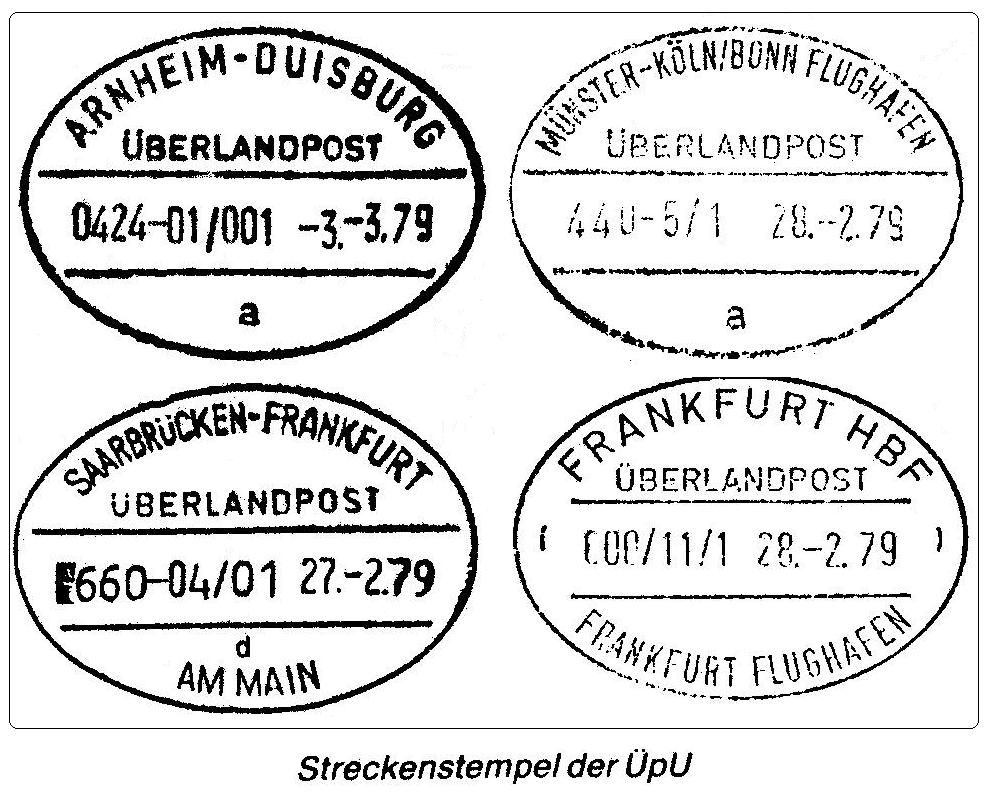 Beispiele für Streckenstempel der Deutschen Straßenposten